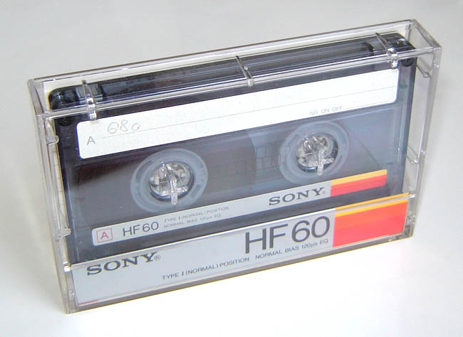 compact audio cassette, normal Fe I tape, Sony